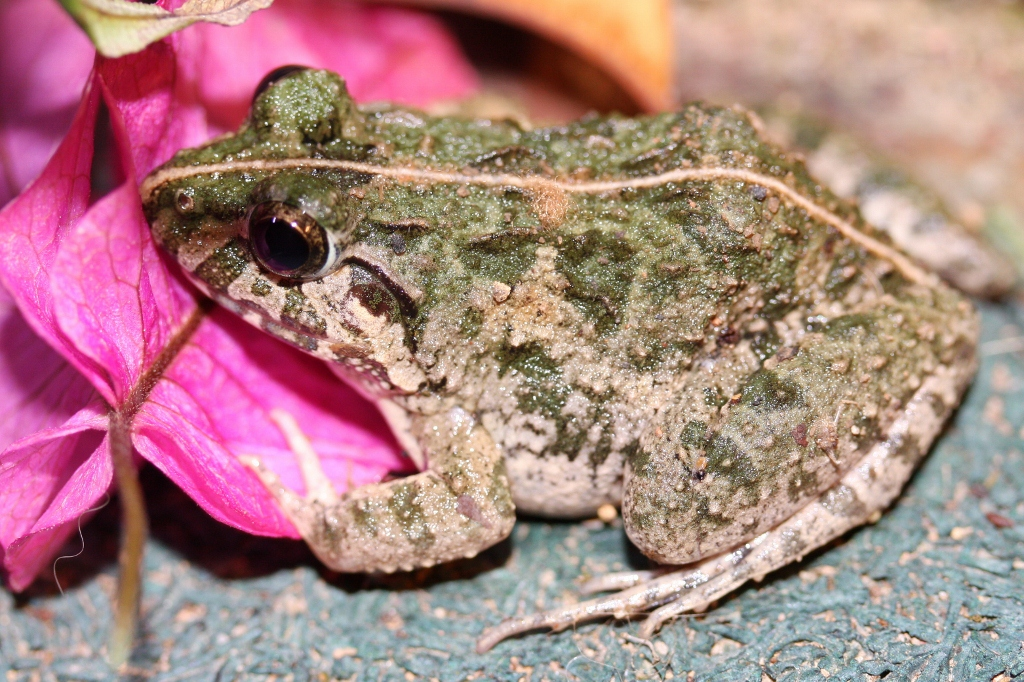 Taken near Ho Chung, Sai Kung.